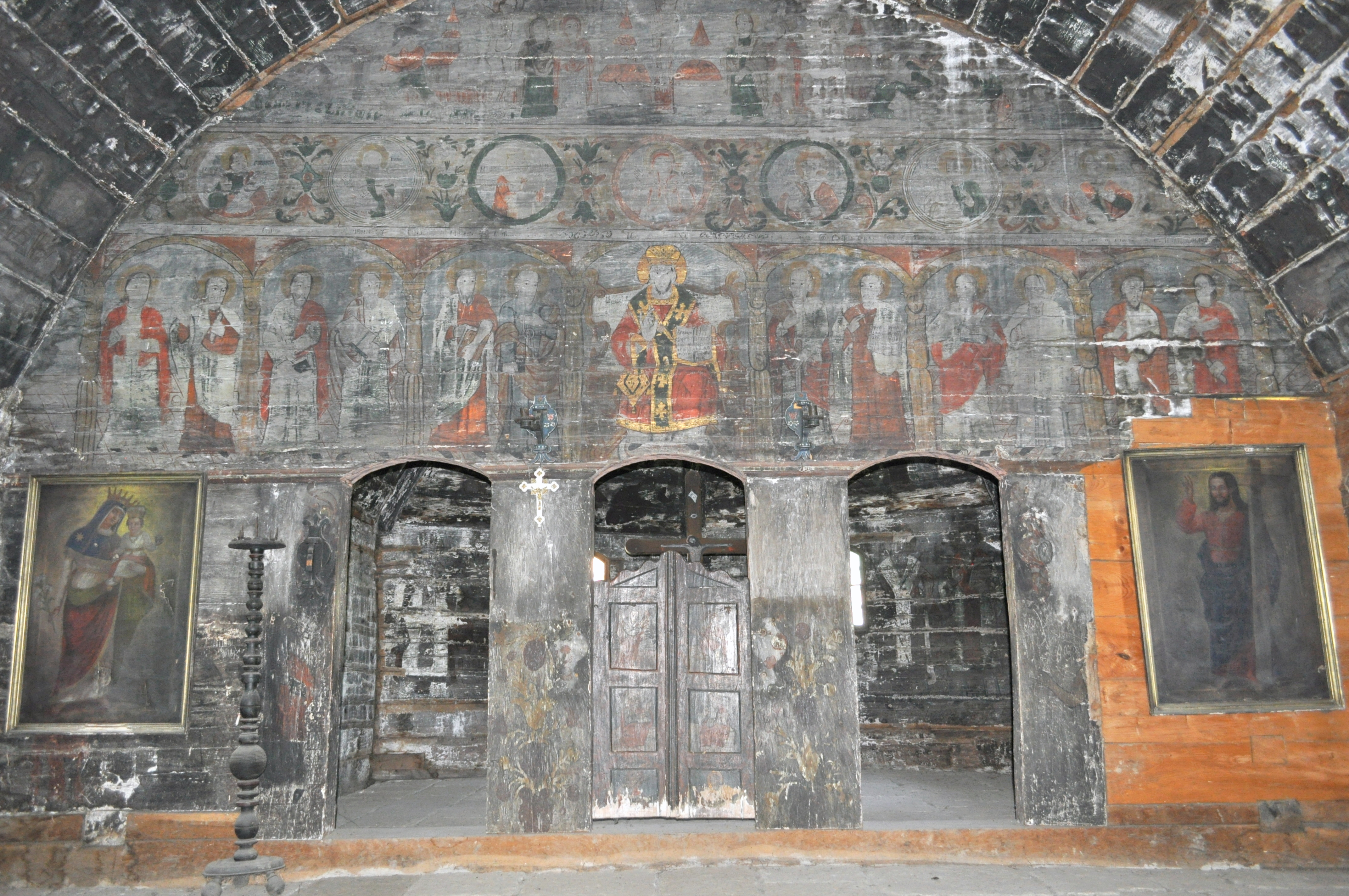 Biserica de lemn din Apahida, județul Cluj